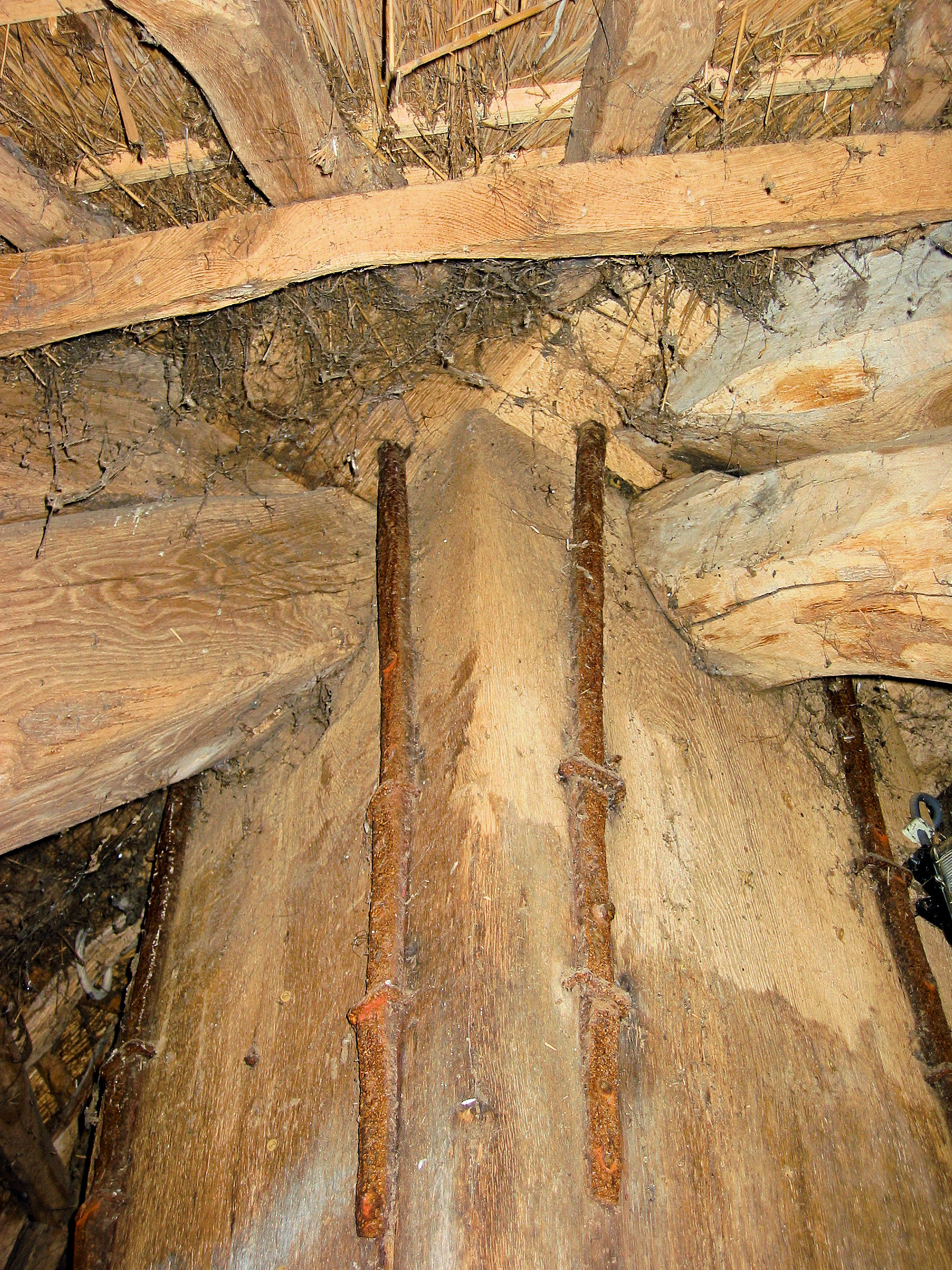 Steekbanden van Doesburgermolen te Ede